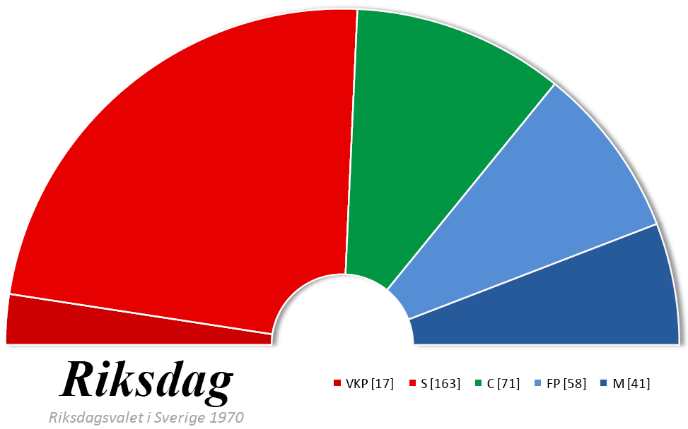 Composition du Riksdag suédois après les élections générales de 1970